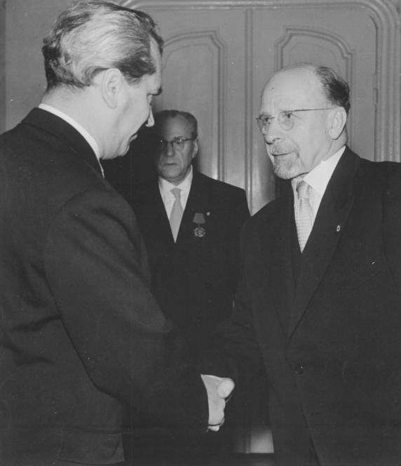 Zentralbild Zühlsdorf 17.10.1960 Walter Ulbricht vereidigte neuernannte Minister. Der Vorsitzende des Staatsrates der Deutschen Demokratischen Republik, Walter Ulbricht, empfing am 17. Oktober im Amtssitz des Staatsrates den Minister für Nationale Verteidigung, Generaloberst Heinz Hoffmann, den Minister und 1. Stellvertreter des Vorsitzenden der Staatlichen Plankommission, Hugo Meiser, sowie den Minister und Stellvertreter des Vorsitzenden der Staatlichen Plankommission Walter Hieke um sie entsprechend Artikel 93 und 105 der Verfassung der DDR für ihre Aufgaben als Minister eidlich zu verpflichten. UBz: Hugo Meiser wird vereidigt.